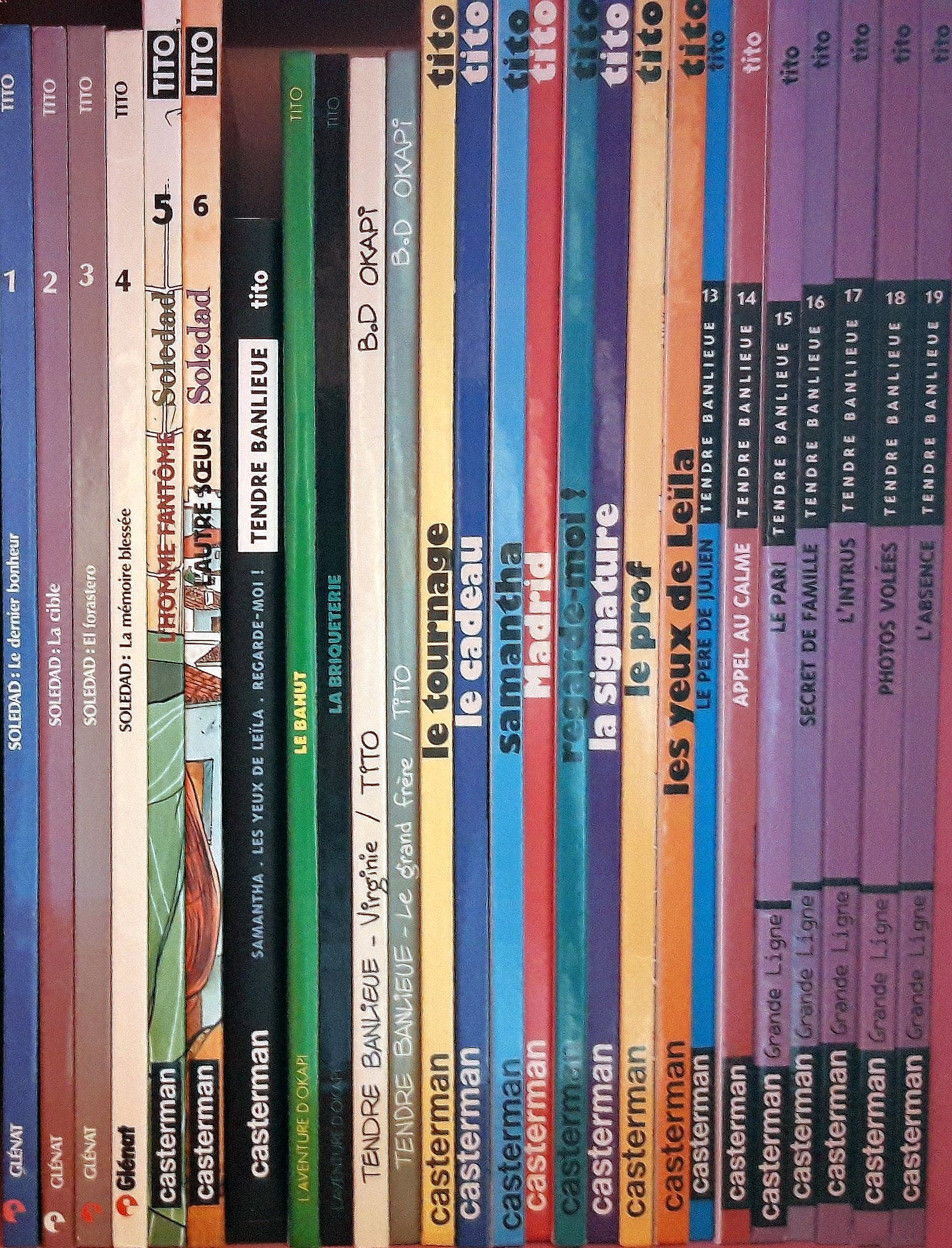 Tito - Soledad 1-6 - Tendre banlieue 1-19.